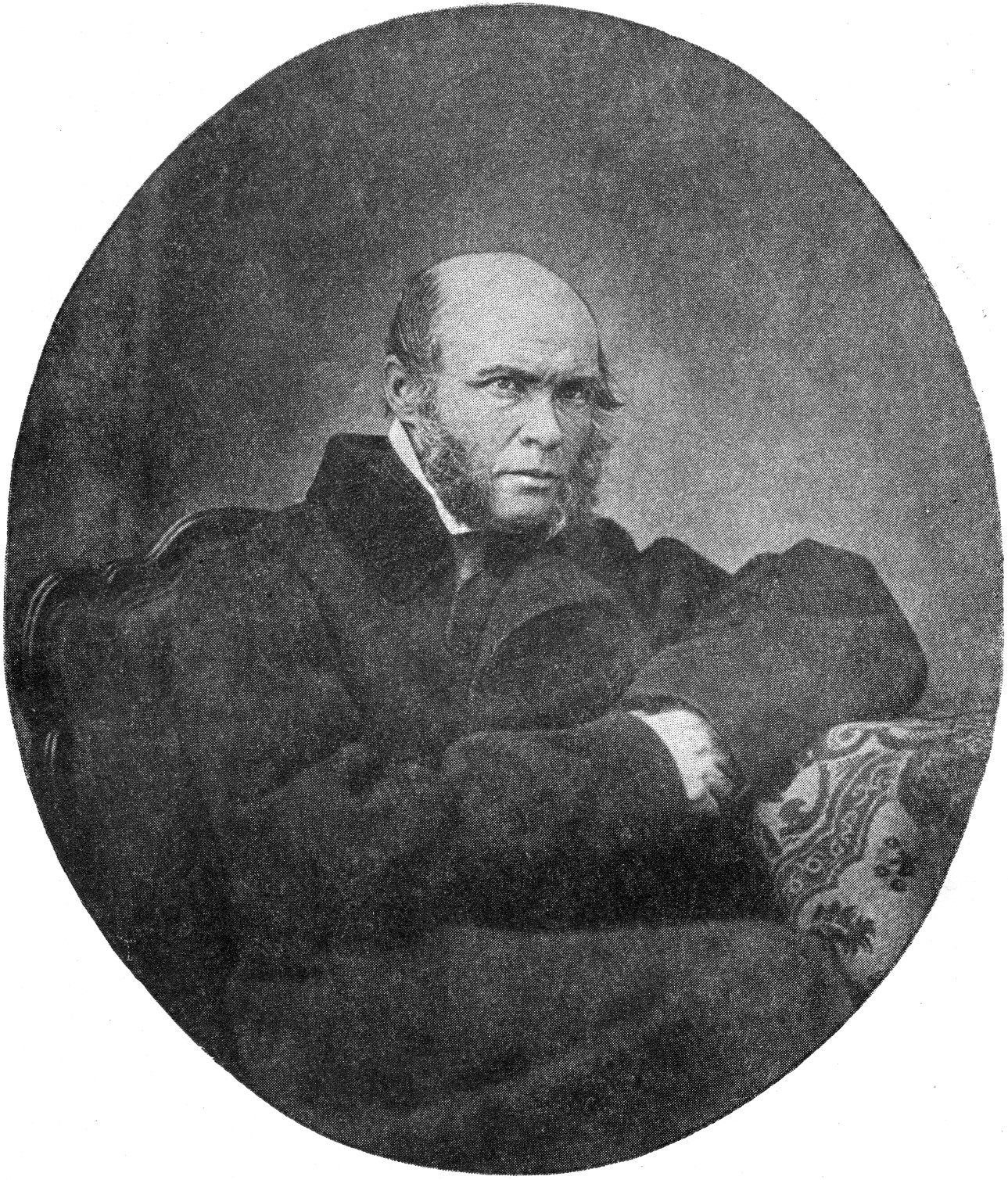 Пирогов Николай Иванович — хирург, анатом, член-корреспондент Санкт-Петербургской академии наук